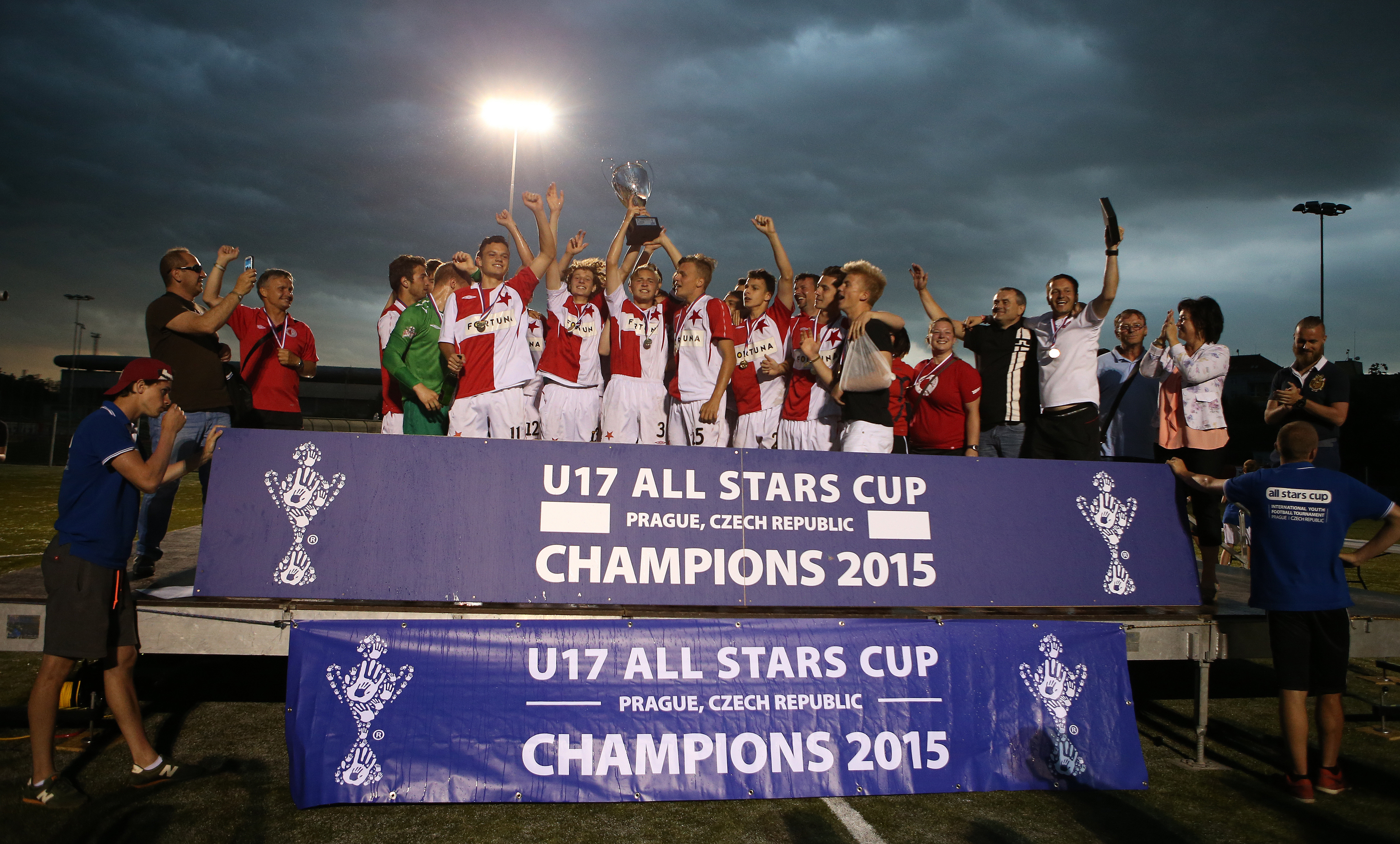 vítěz ASC 2015 SK Slavia Praha